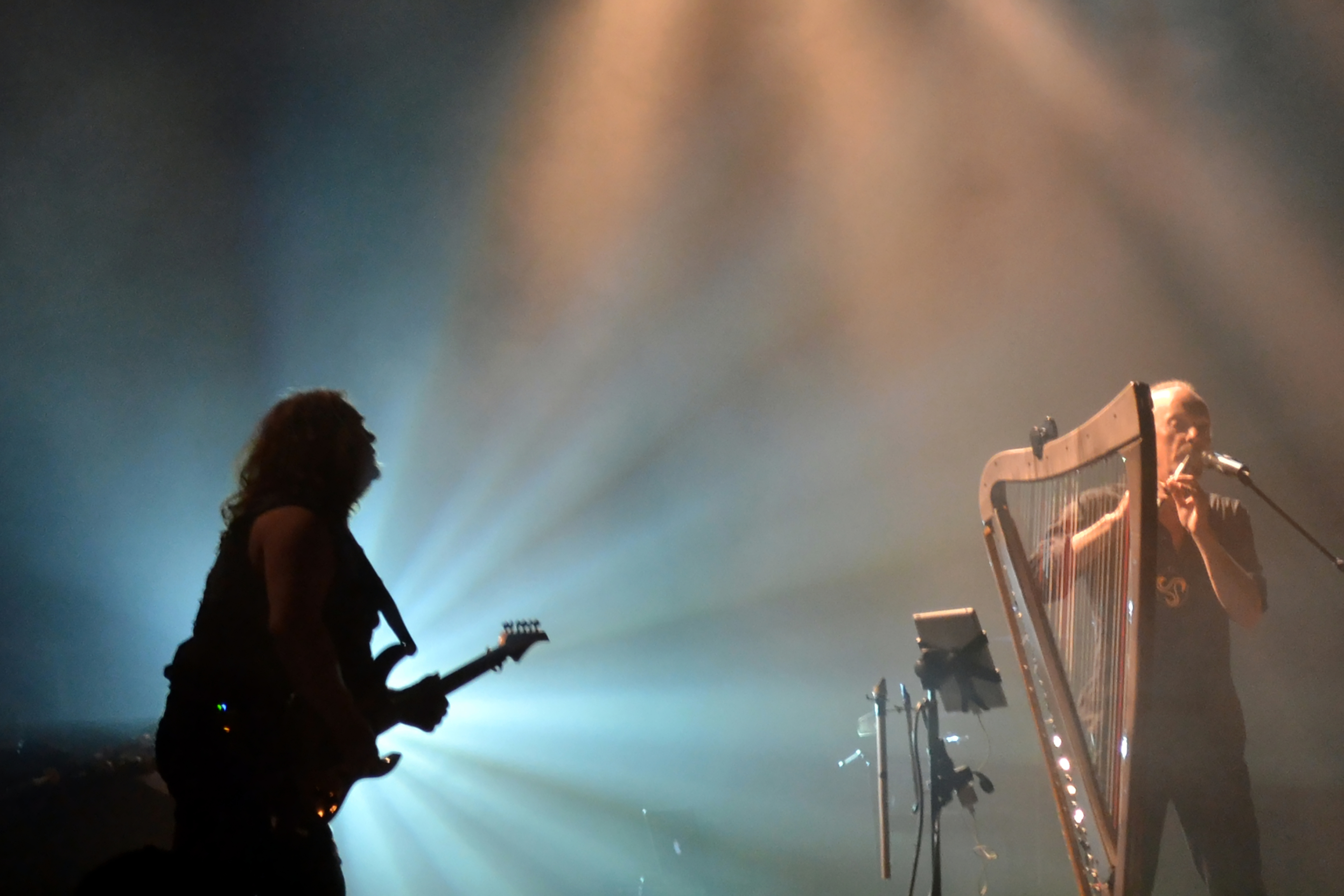 Alan Stivell, accompagné du guitariste Pat O'May, en concert gratuit lors des Jeudis du port à Brest le 15 août 2013.